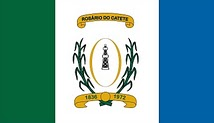 Bandeira de Rosário do Catete - Sergipe